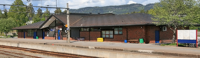 Moelv stasjon. Bygd 1981, arkitekt Arne Henriksen